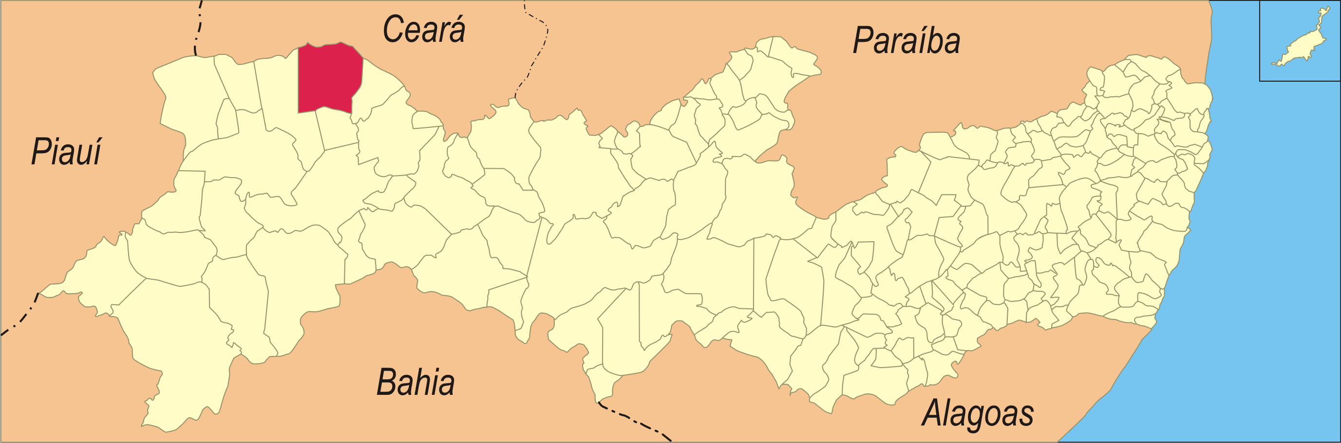 Localização da cidade em Pernambuco